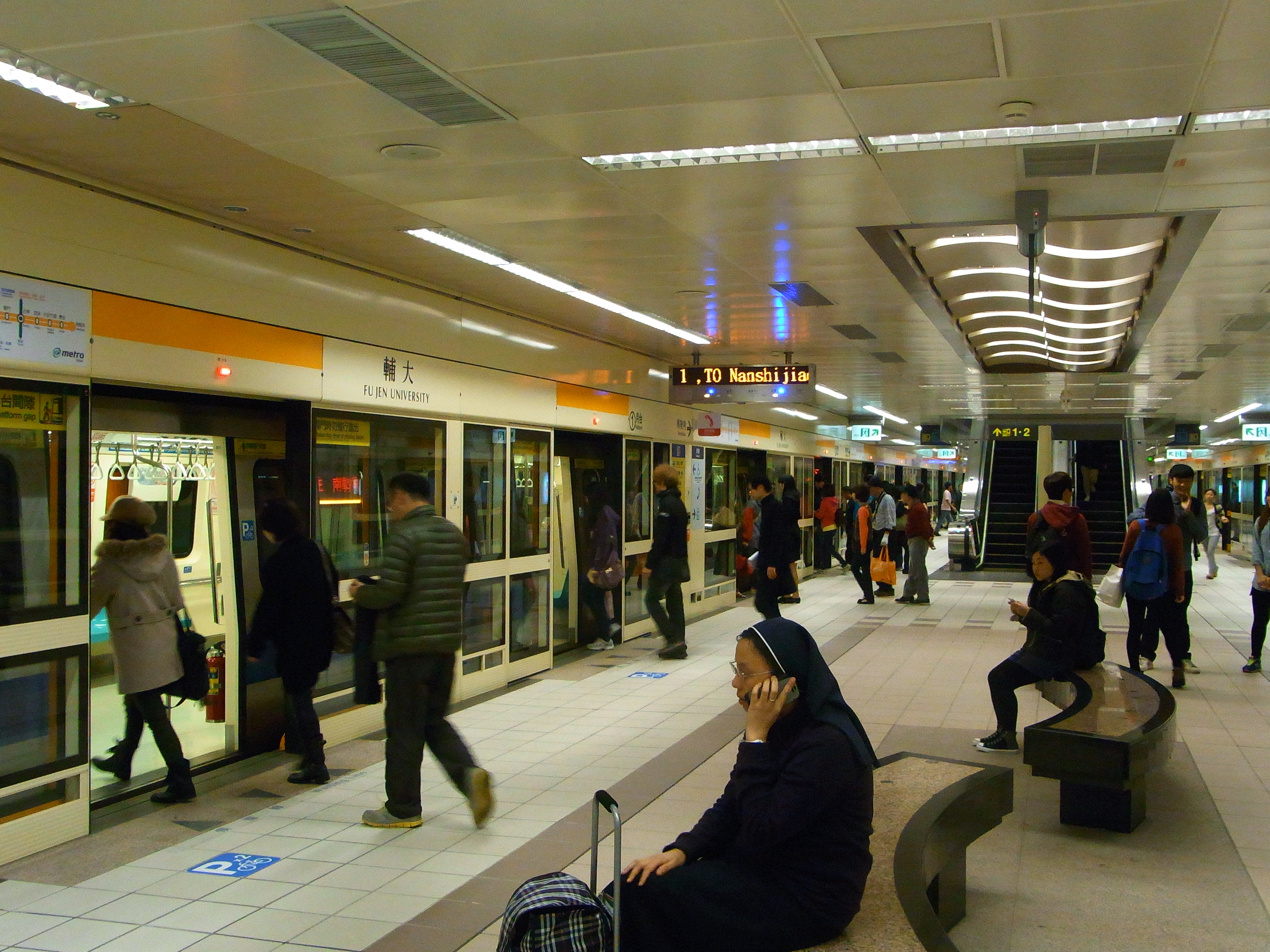 台北捷運輔大站月台